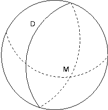 Droites parallèles en géometrie elliptique